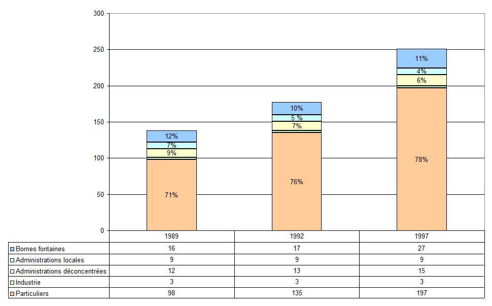 Nombre d'abonnés au réseau de distribution d'eau, par catégorie, à Tougan (Burkina Faso), en 1989, 1992 et 1997.